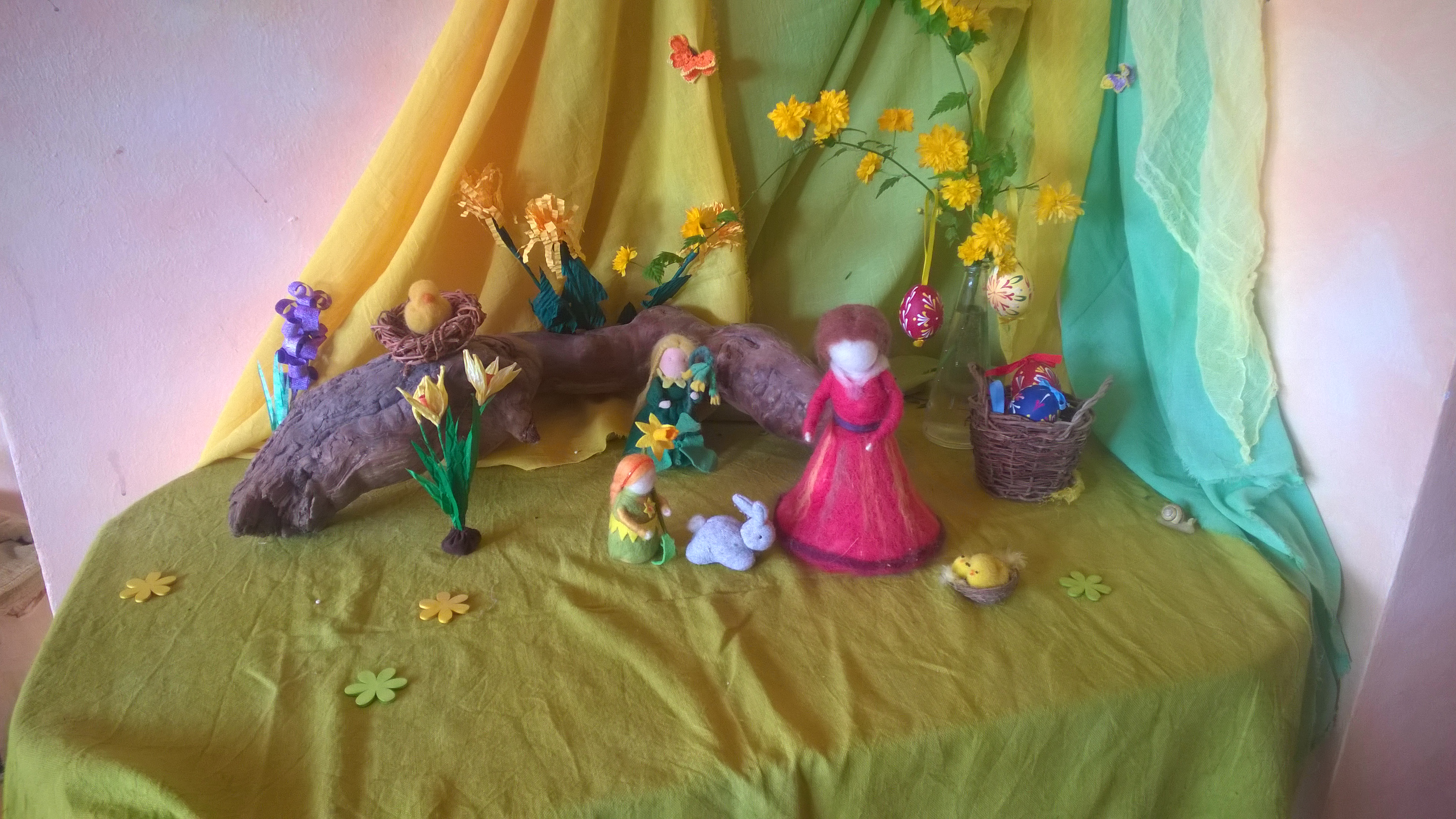 Stoleček ročních dob - Jaro-období Velikonoc - Waldrofská škola Praha Dědina - 2. třída